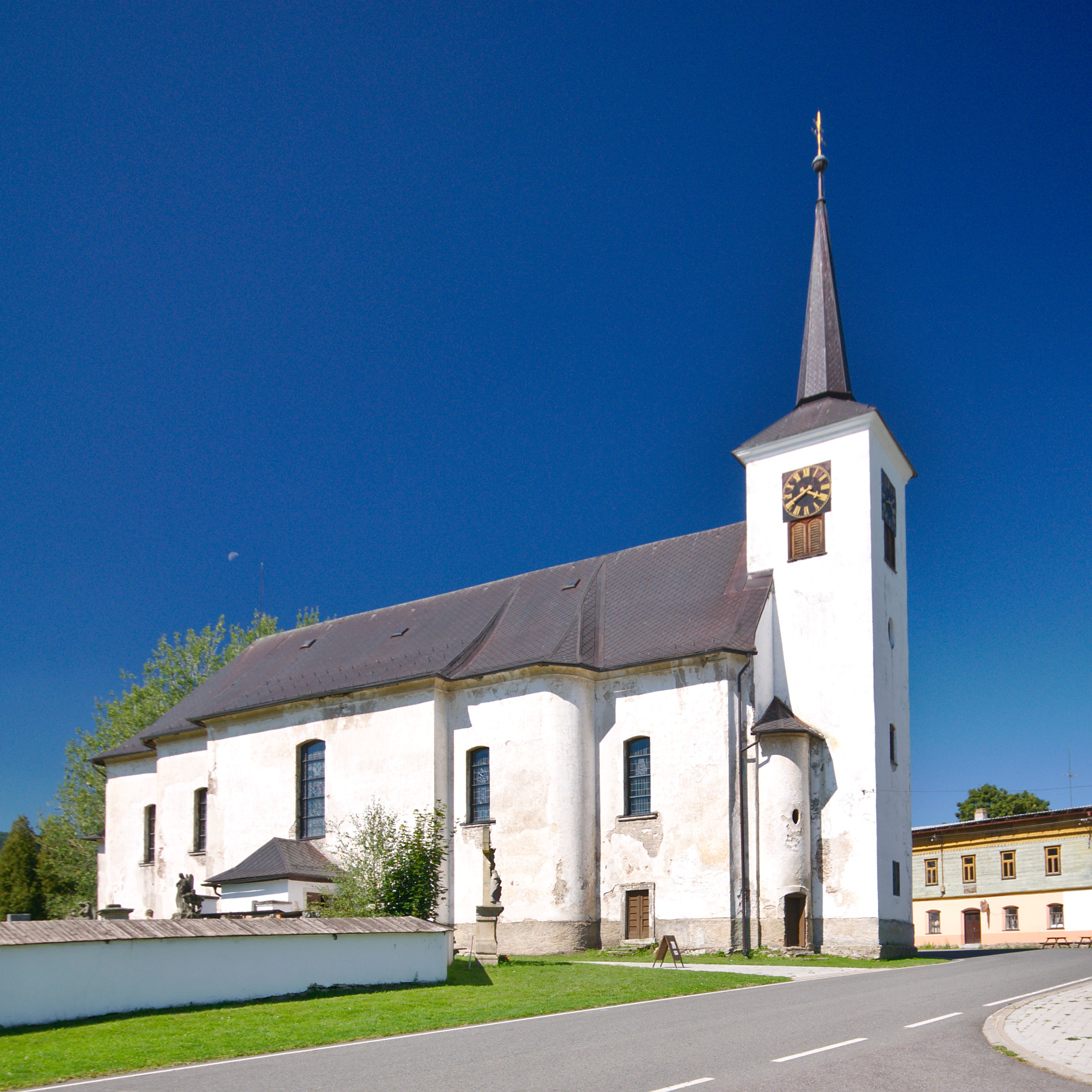 Kostel svatého Jana Křtitele, Orlické Záhoří, okres Rychnov nad Kněžnou